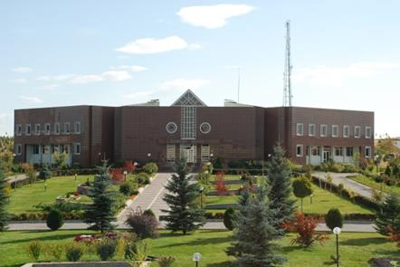 Jandarma ve Sahil Güvenlik Akademisi Jandarma Müzesi